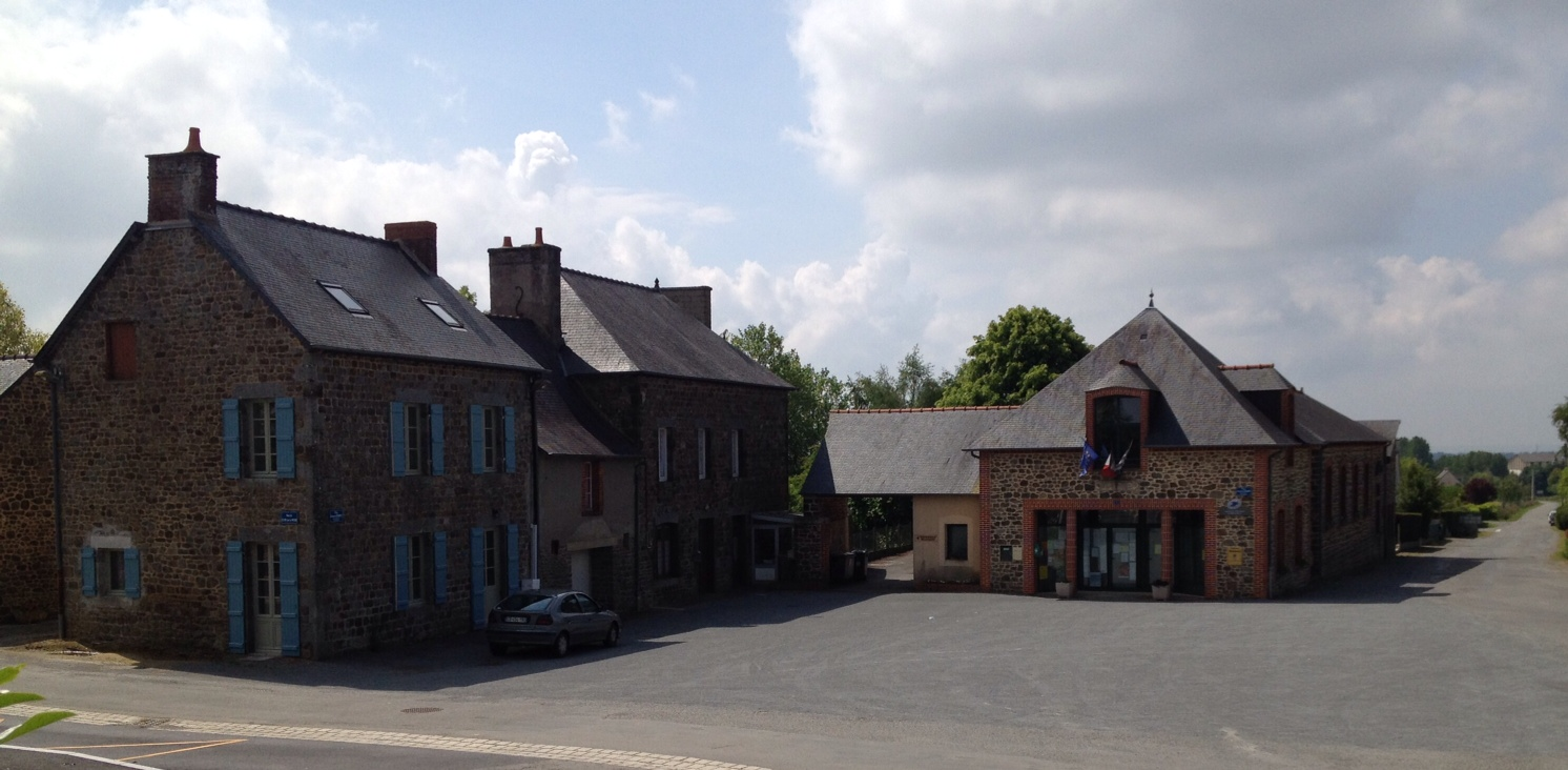 Place Constant Gendrot (Mairie)